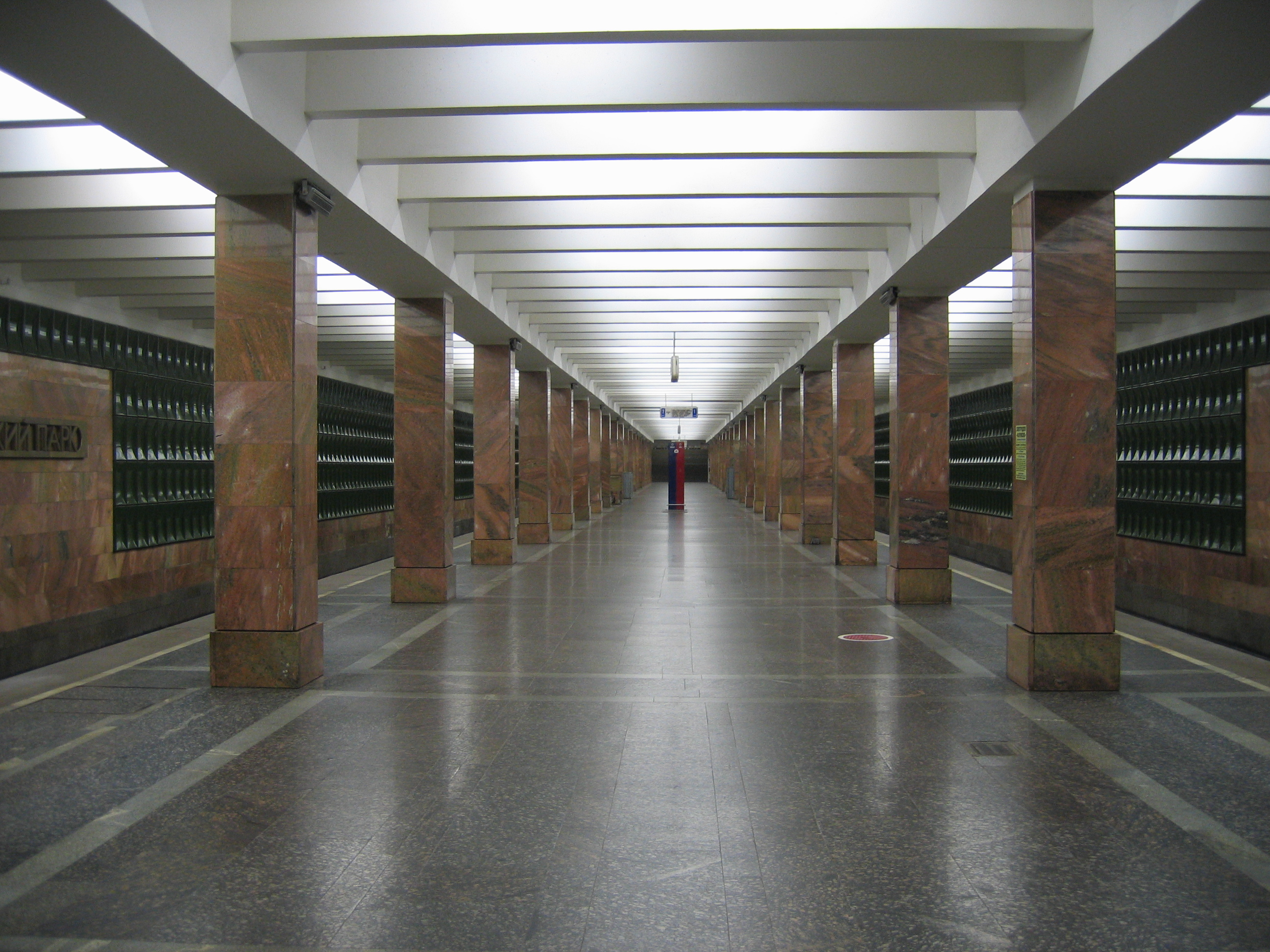 Station Nowojassenewskaja (ehemals Bitzewski Park) der Metro Moskau